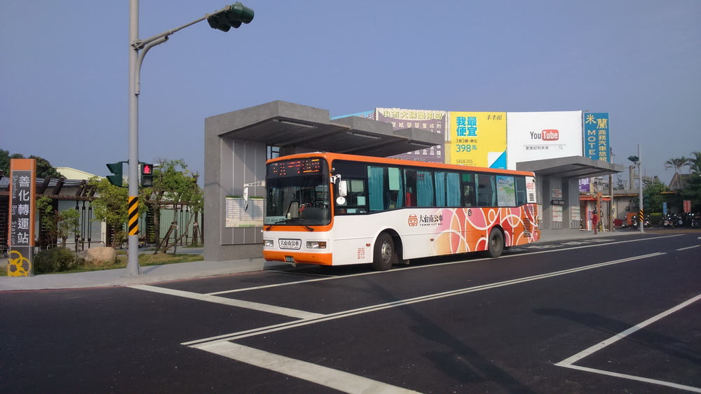 中文（台灣）: 大台南公車停靠善化轉運站